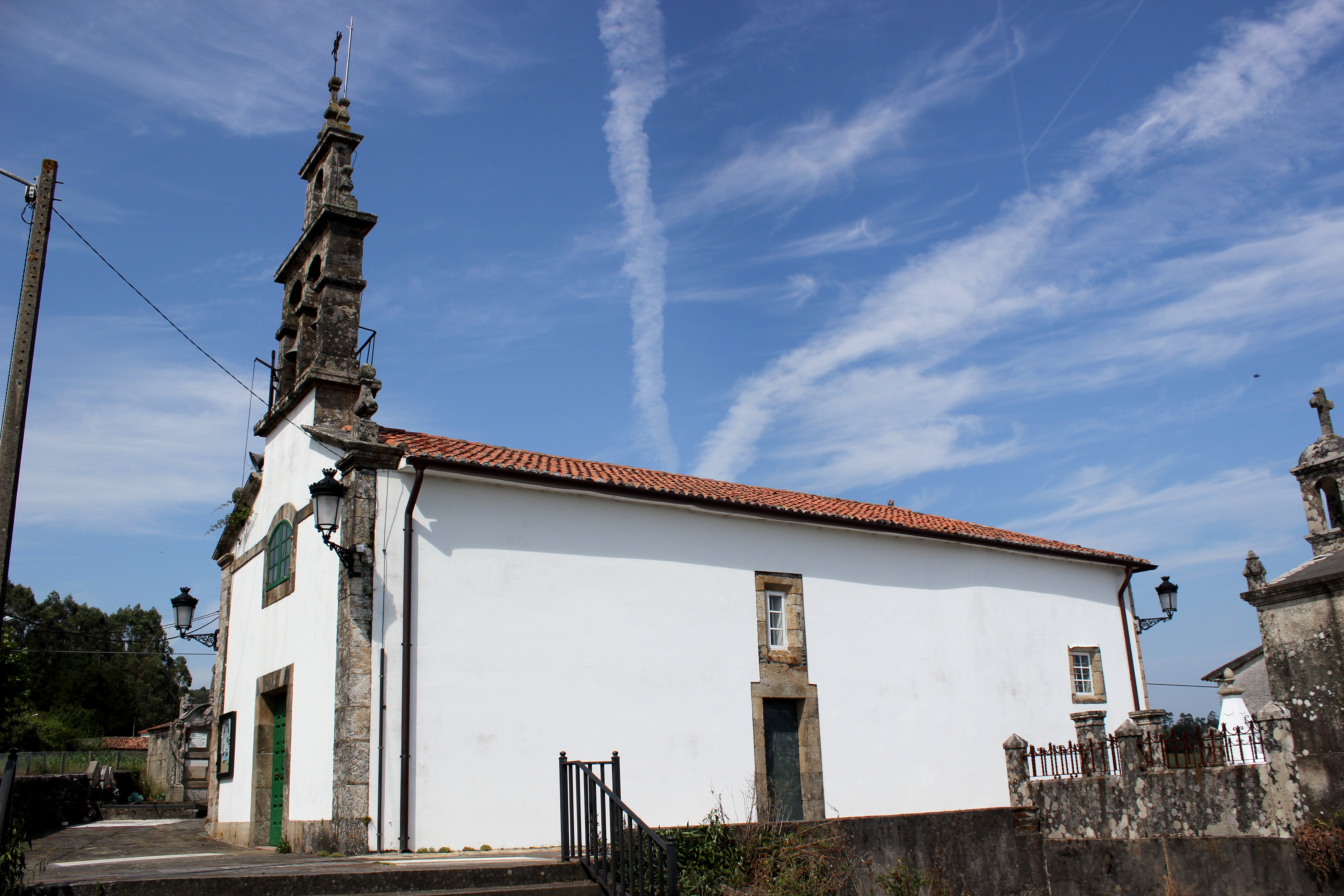 Igrexa de Castrofeito no concello do Pino